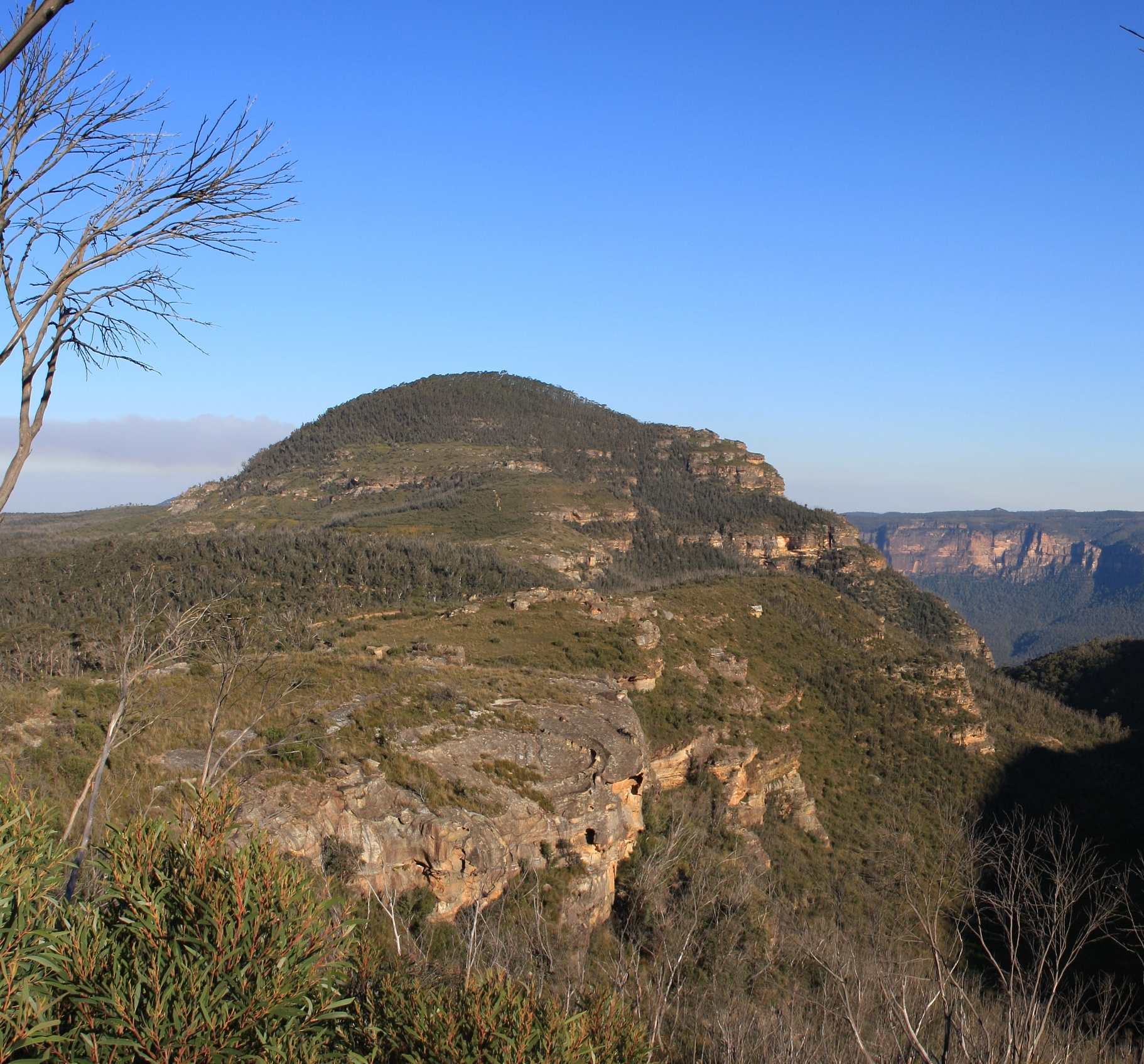 Mount Banks